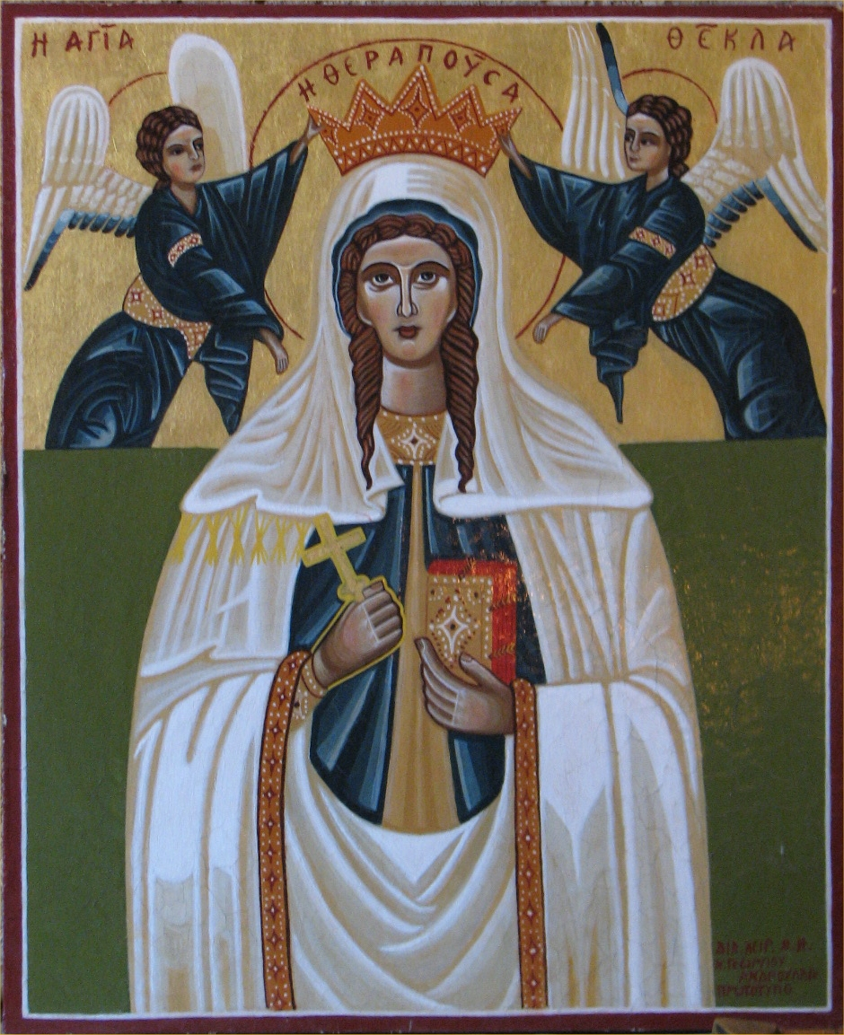 Hellige Thekla (Saint Thecla)